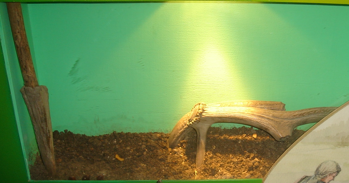 rogowa kopaczka i motyka służące do kopieniaczych upraw.